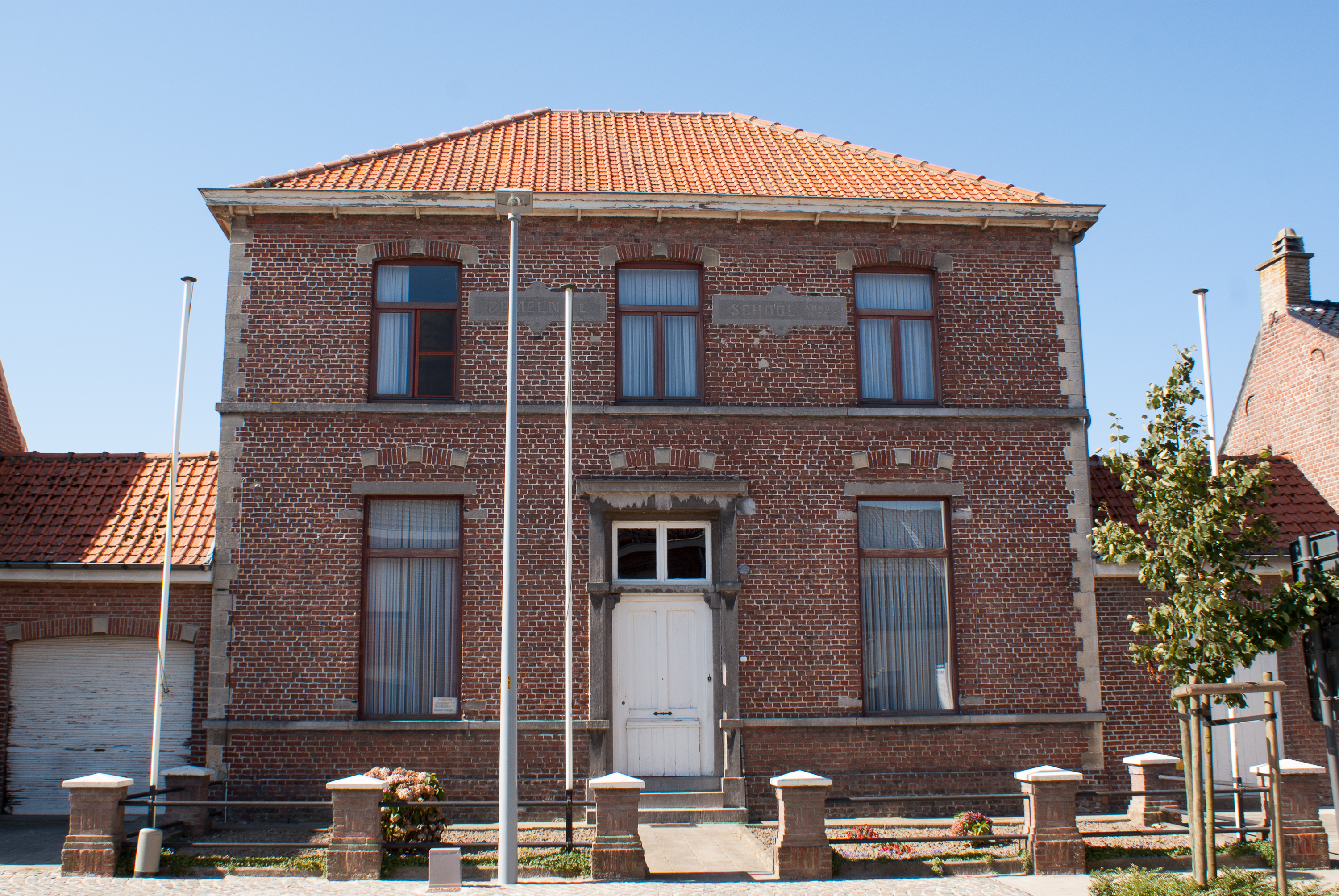 voormalige gemeenteschool van alveringem uit 1874